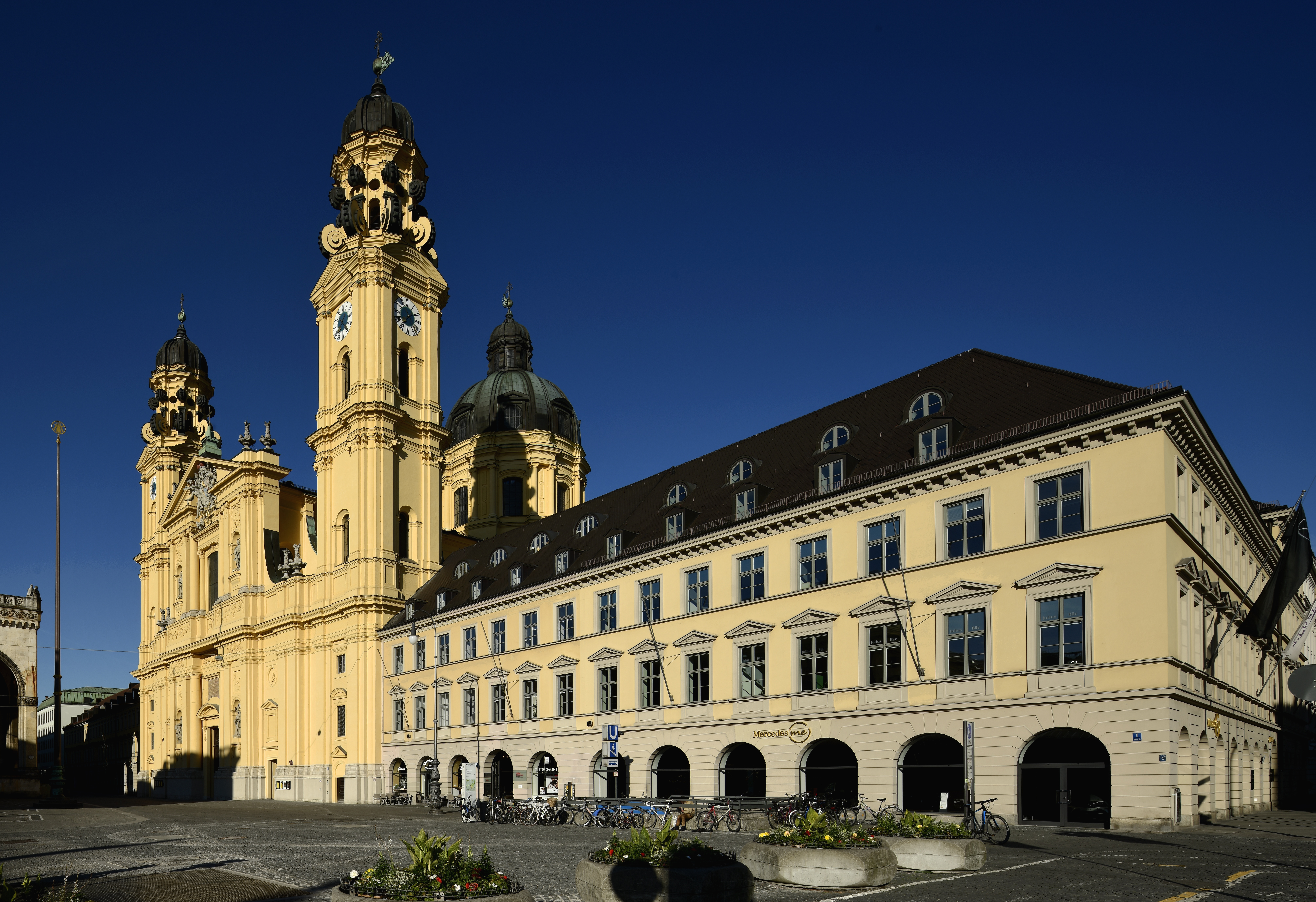 München, Odeonsplatz. Theatinerkirche, Fassadenansicht Theatinerstraße 23 und Brinner Straße, Palais Moy, 1. Juni 2019. Das Gebäude entstand in den Jahren 1824 bis 1825 nach Plänen Klenzes, ausführunder Baumeister war Joseph Höchl. Nach einem Luftangriff vom 17. Dezember 1944 war das Gebäude zerstört und ausgebrannt. Der Fotograf Johann Meyer kann am 19. Dezember 1944 die Situation am Odeonsplatz festhalten.